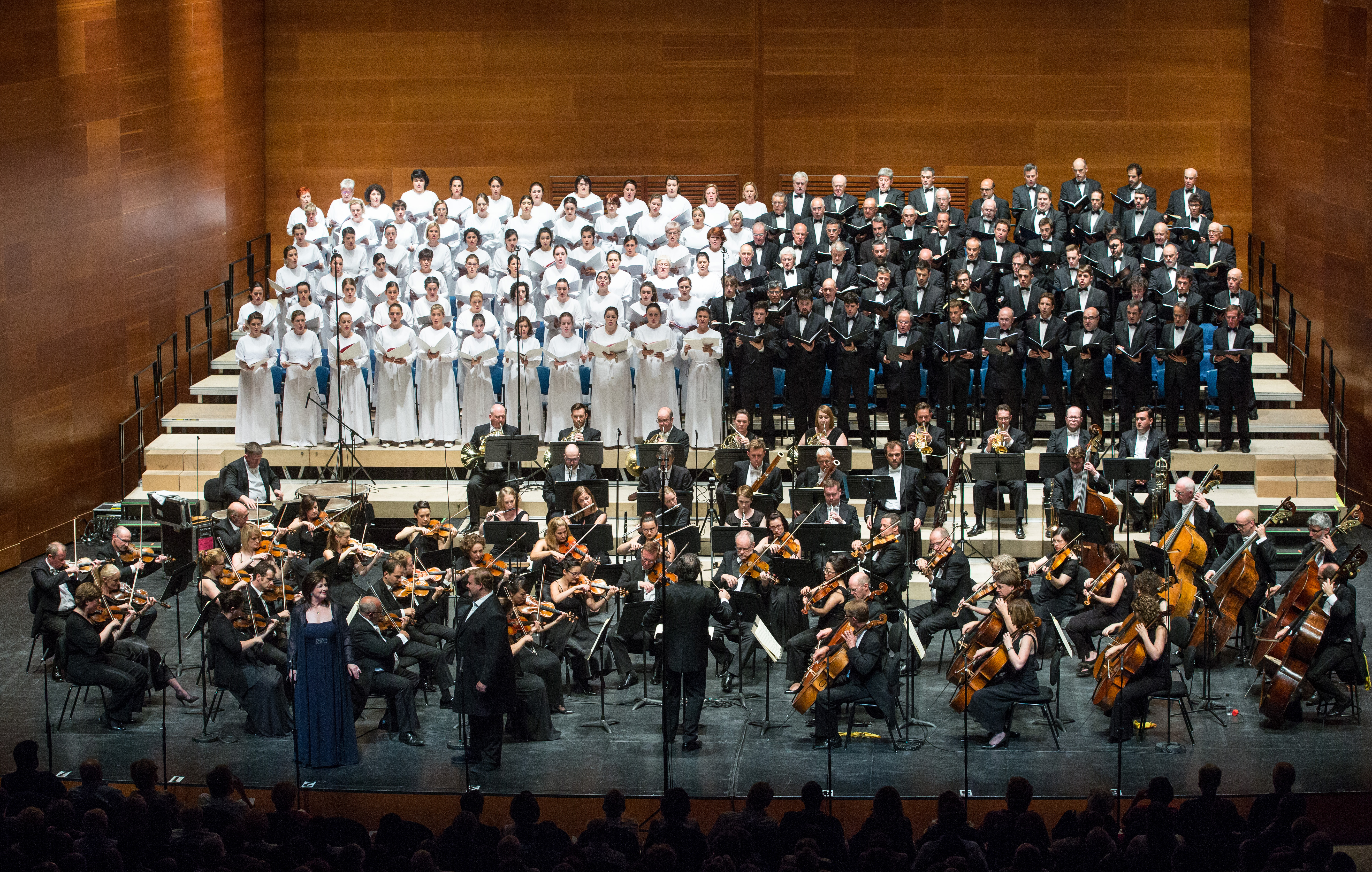 © Quincena Musical- Iñigo Ibáñez